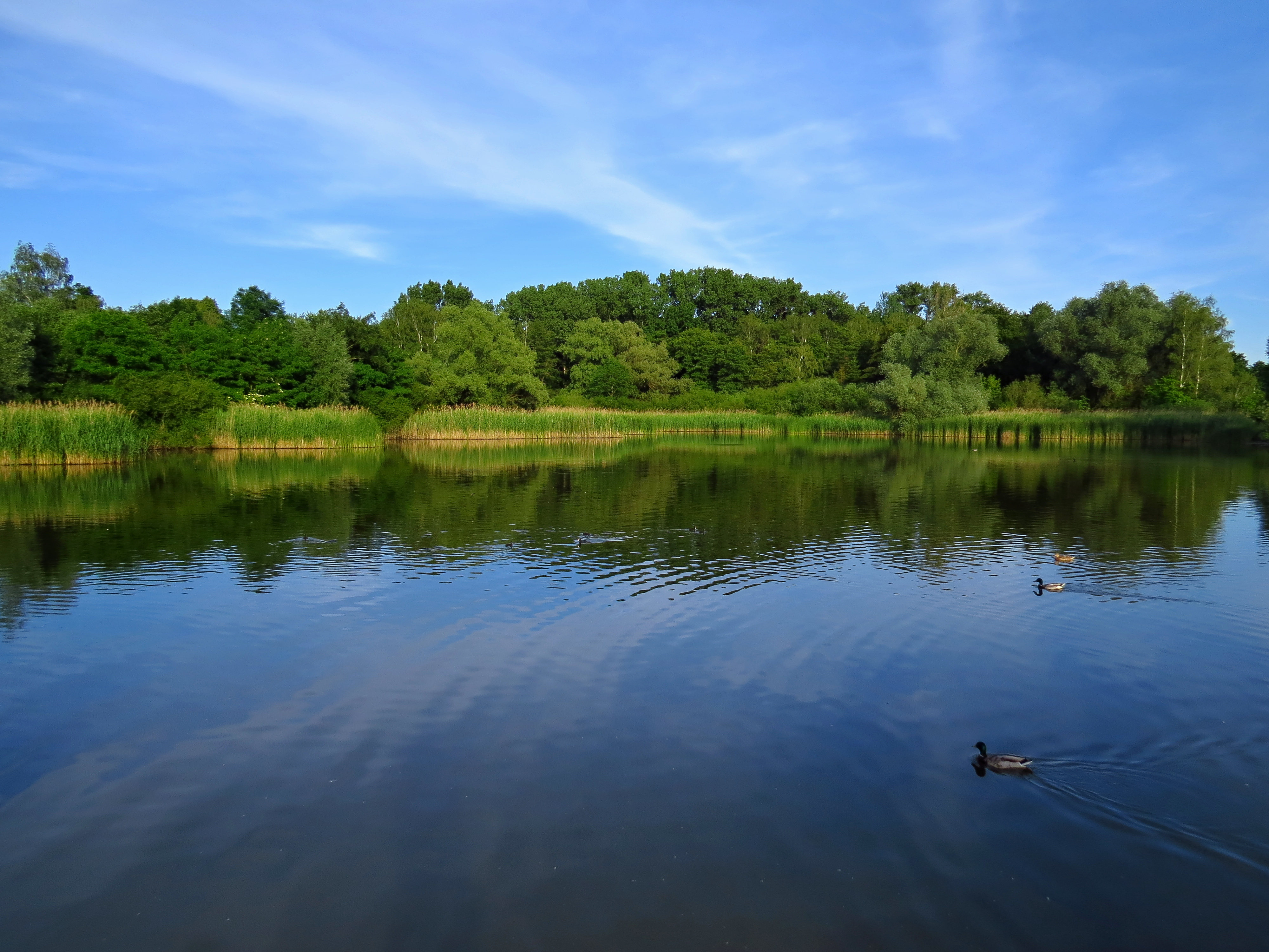 PP Na Plachtě